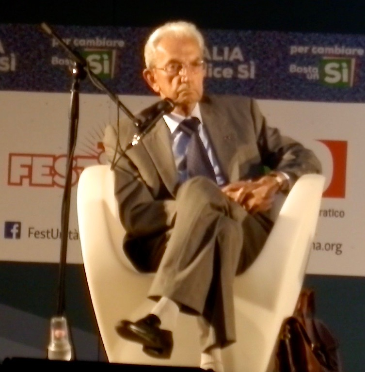 Il presidente dell'A.N.P.I. e politico Carlo Smuraglia durante il confronto con Matteo Renzi nella Festa dell'Unità di Bologna nel settembre 2016